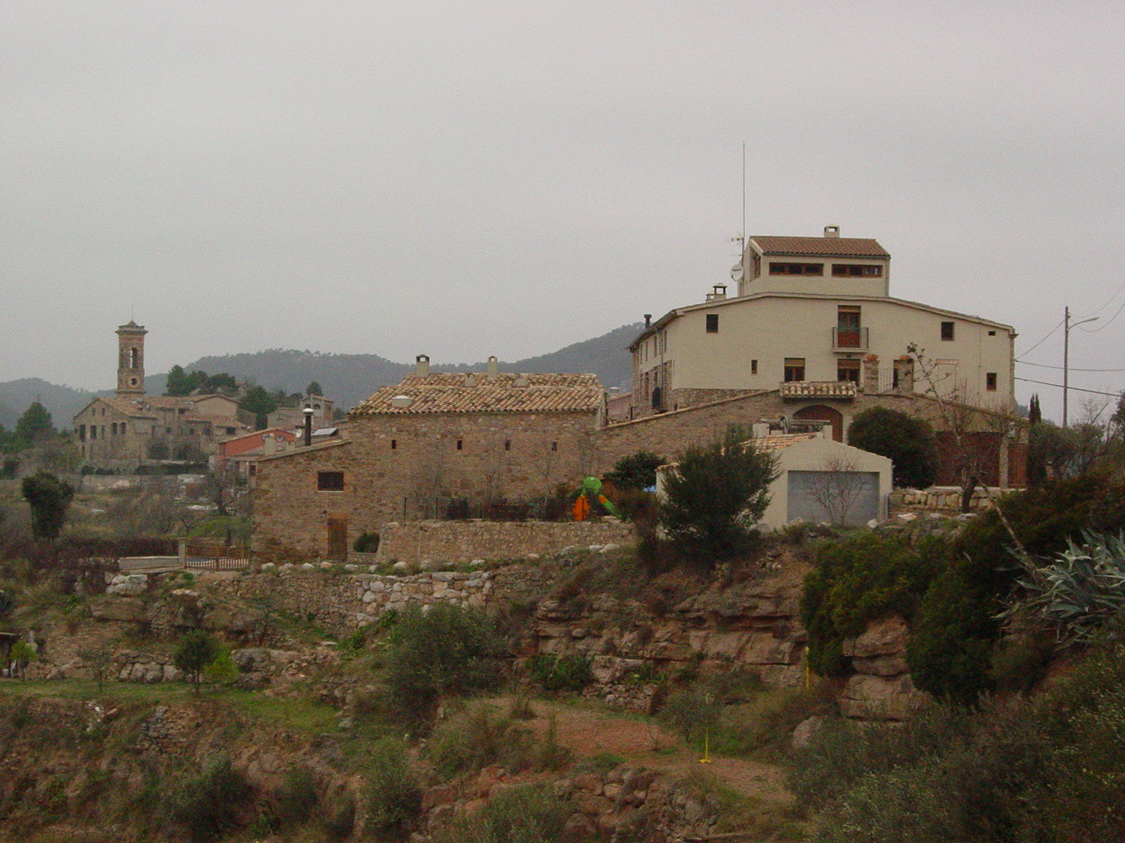 Vista General del Vilar